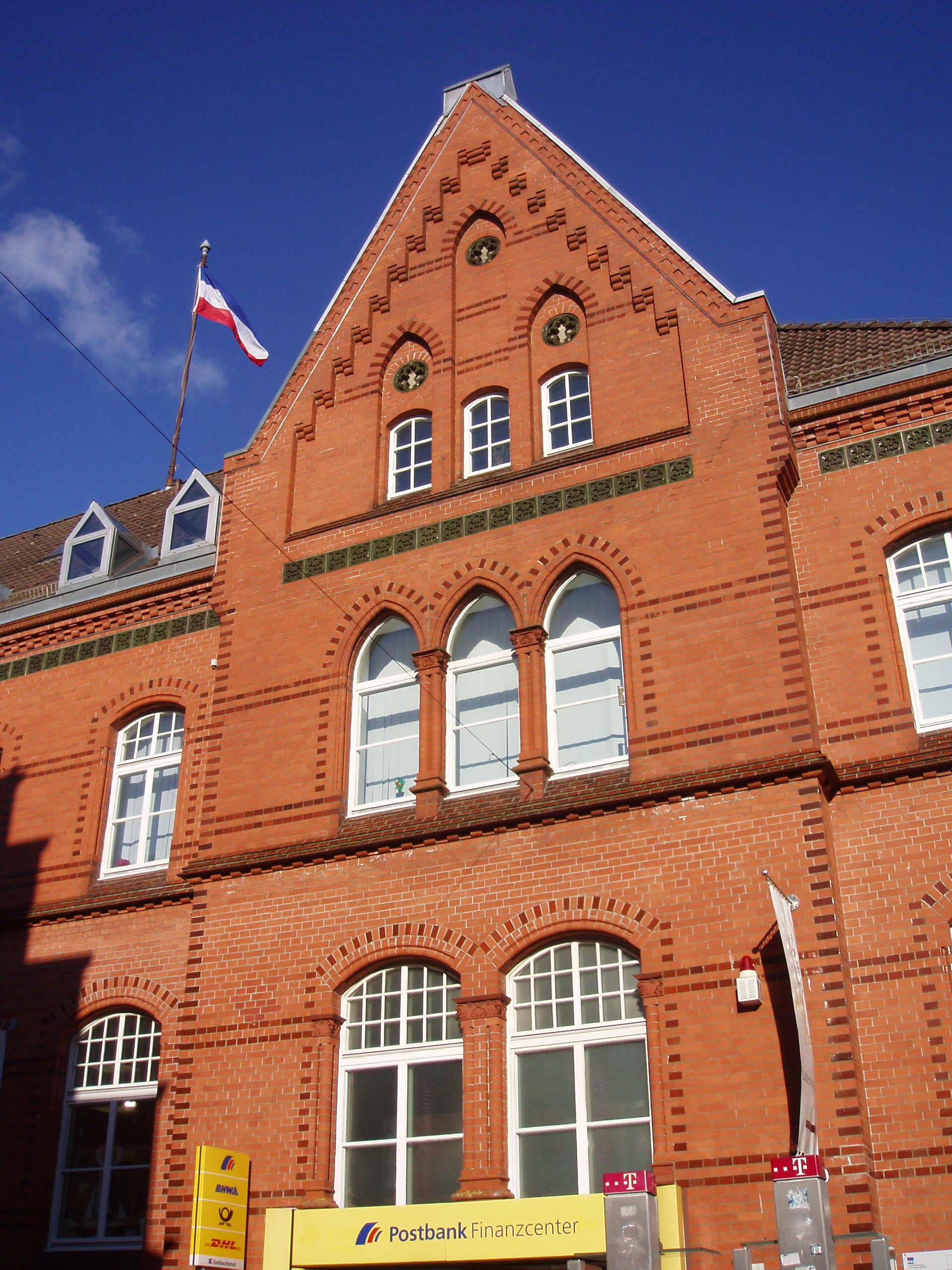 ehemalige Post in Eckernförde, heute Einkaufspassage und Post